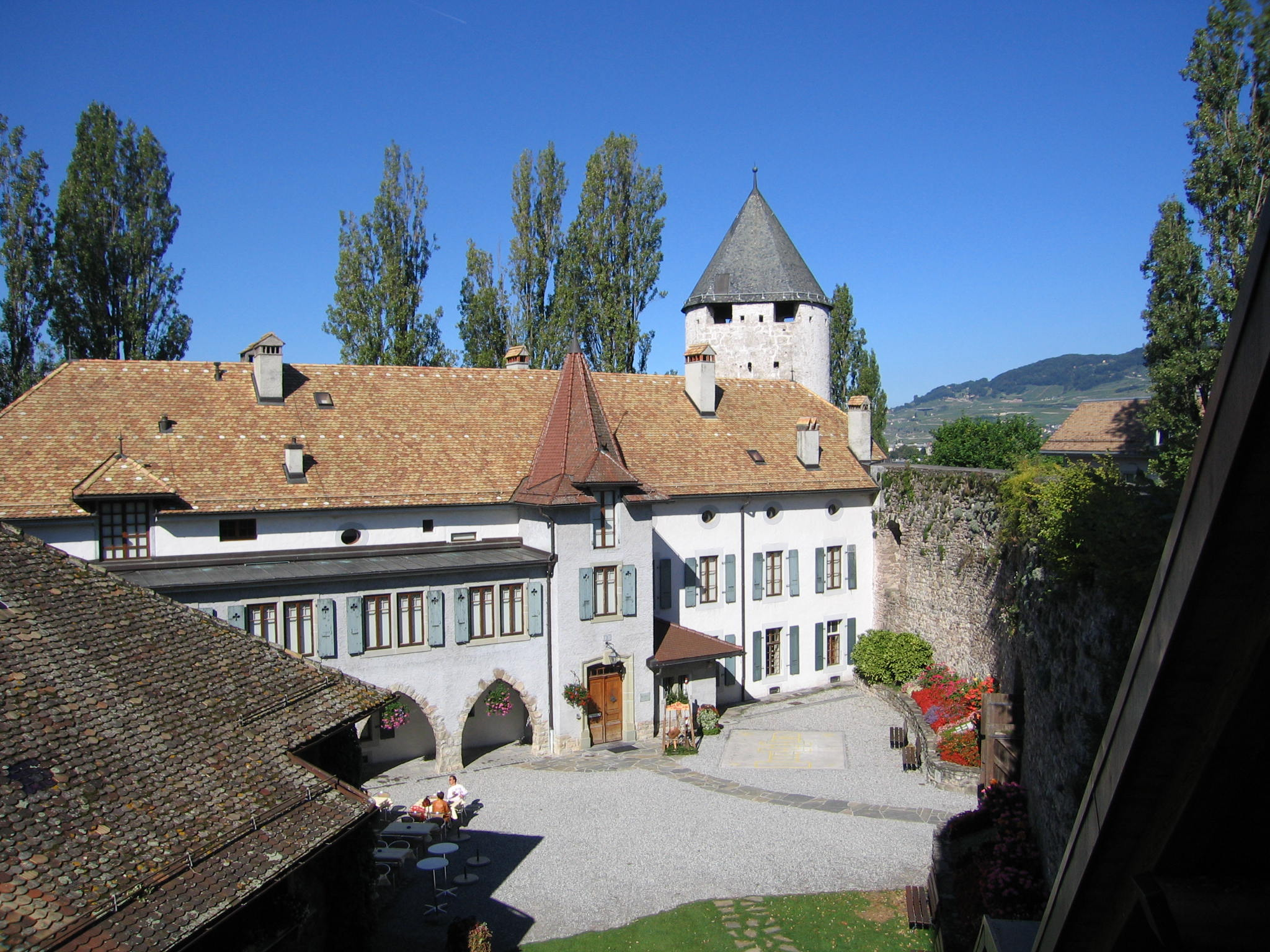 Photo du Château de la Tour-de-Peilz qui abrite le Musée Suisse du Jeu